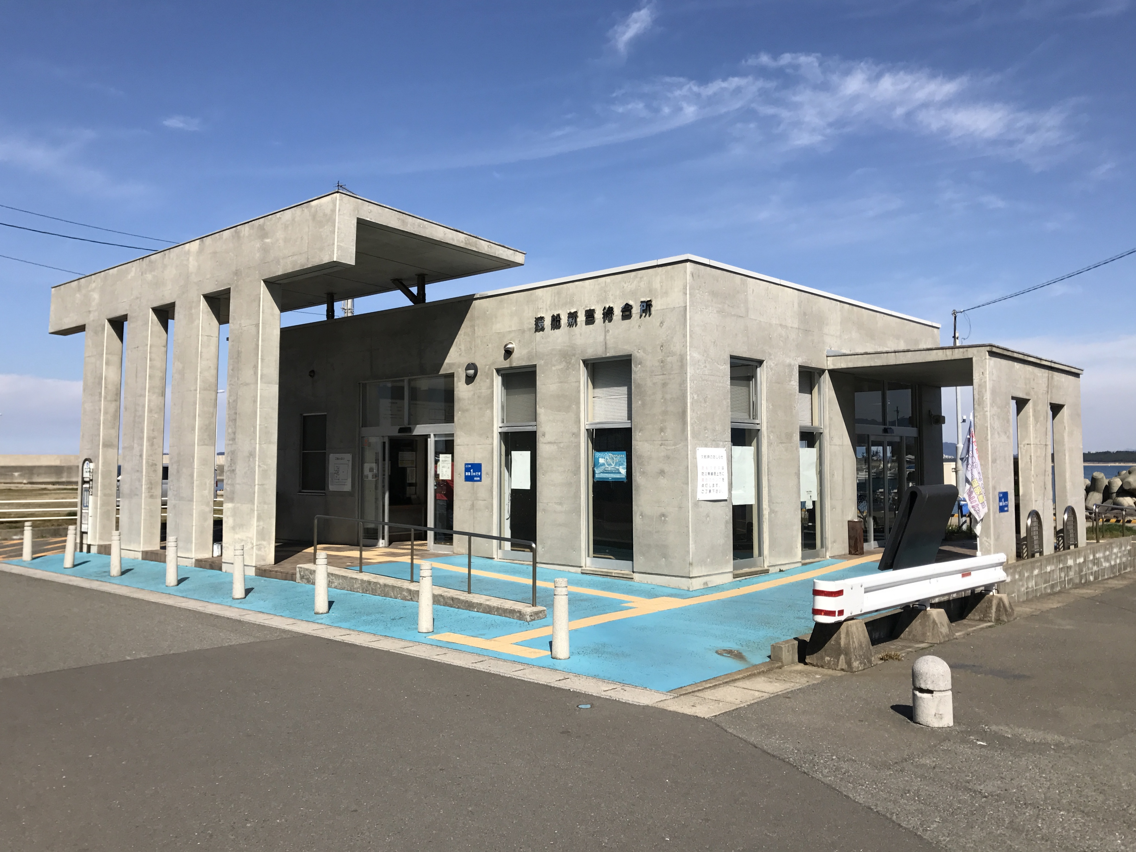 新宮町営渡船・新宮旅客待合所